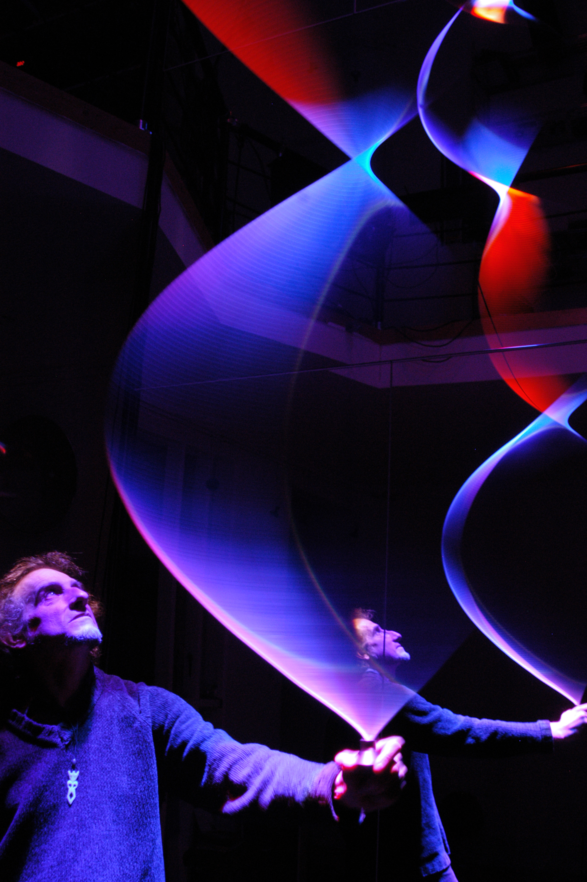 Obra de Paul Friedlander